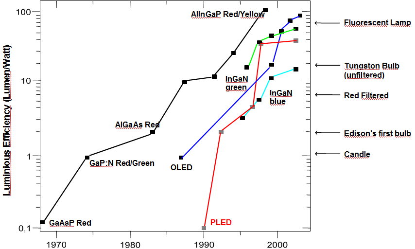 Der strategische Einsatz von Technologien - Konzepte und Methoden zur Einbeziehung von Technologien in die Strategieentwicklung des Unternehmens